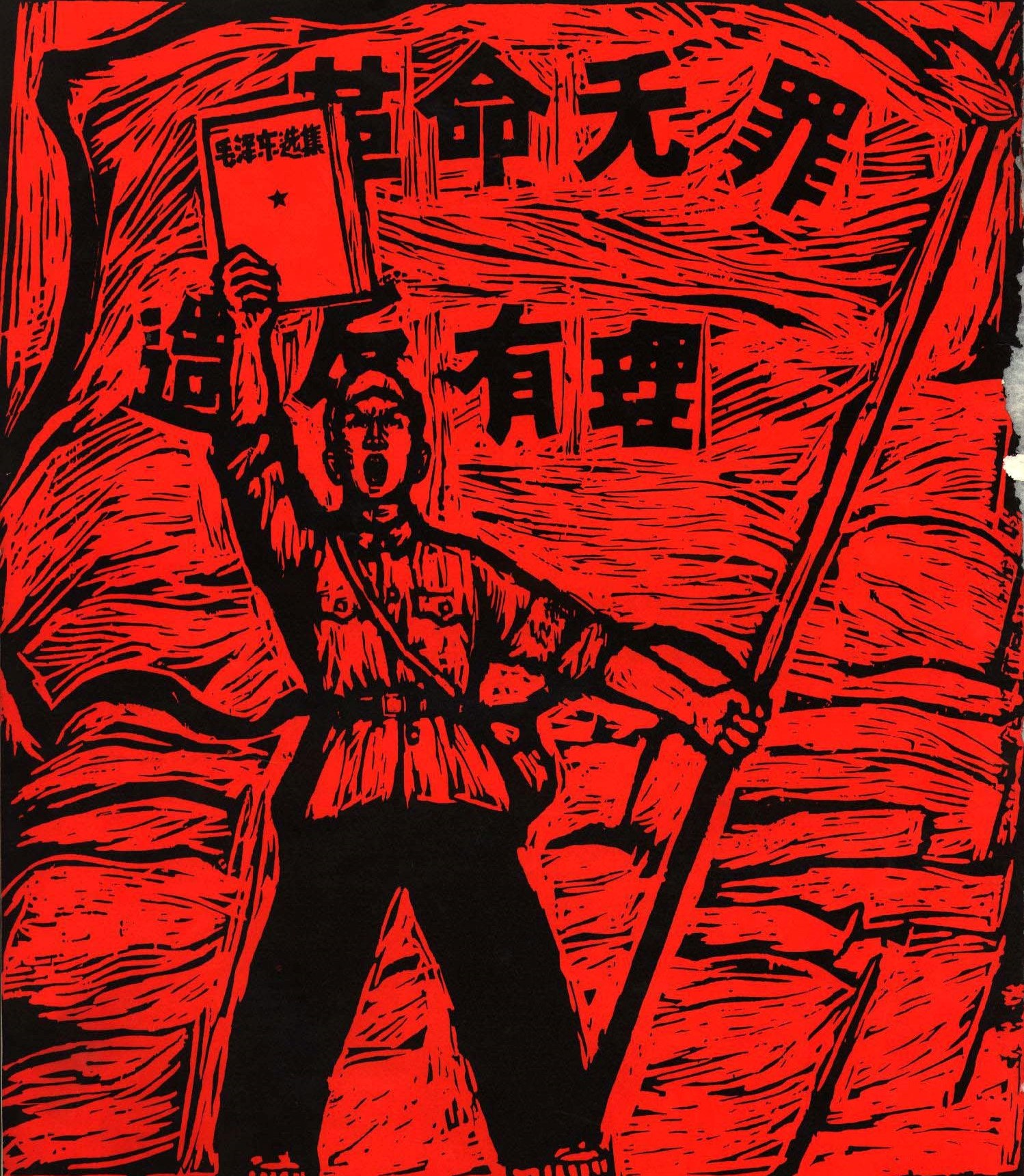 1967-04 1967年革命无罪造反有理